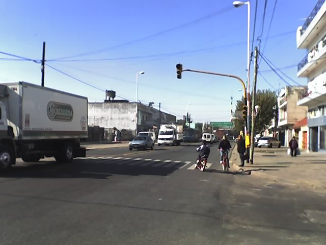 Avenida Mitre, Paso del Rey, Provincia de Buenos Aires.